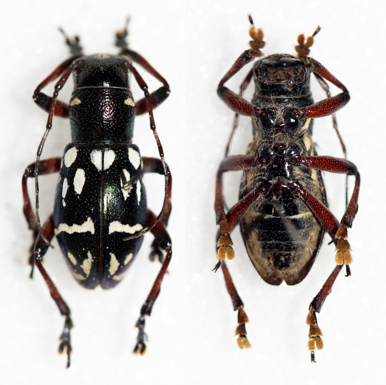 Newman,1842 Sex: ? Data: 07-2014 - Banaue - Ifugao - North Luzon - Philippines Size: 17.5mm